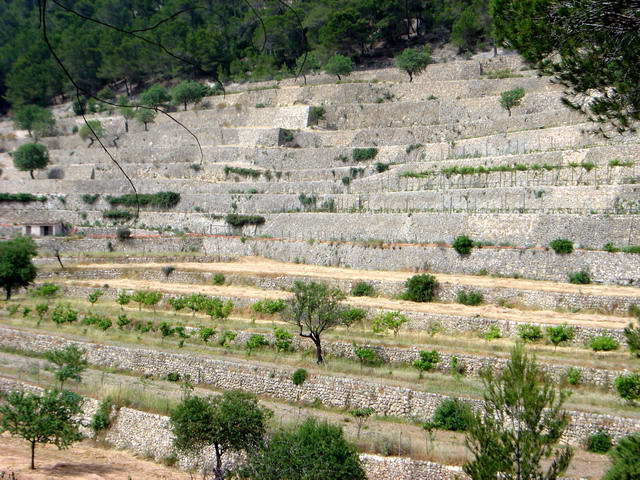 Marjades